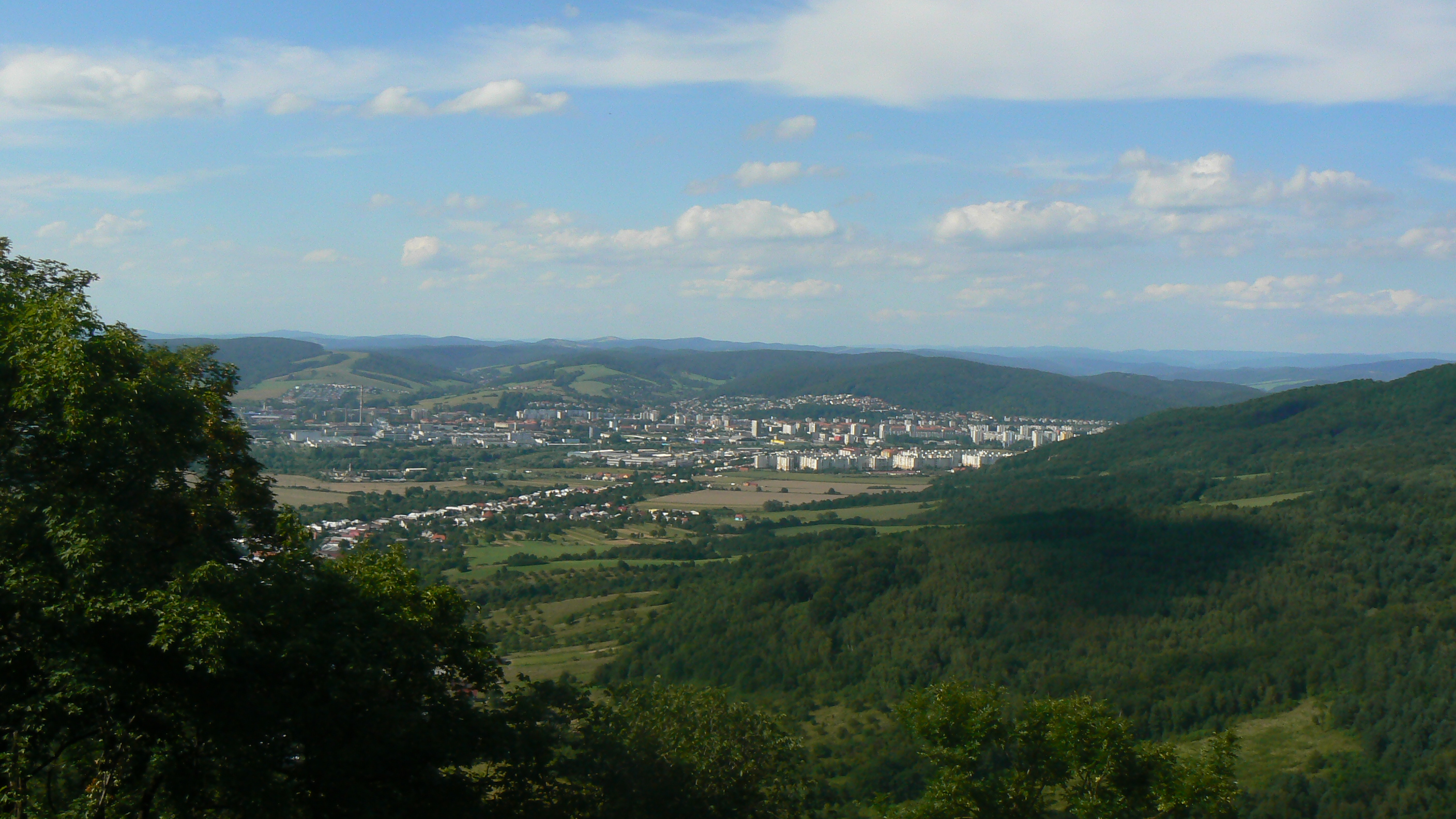 Jasenovský hrad - zrúcanina hradu.